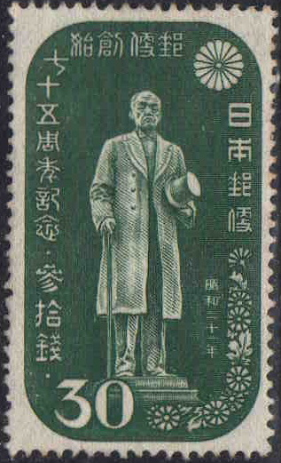 1946年（昭和21年）に発行された郵便事業創始75周年記念切手のうち、前島密を描く30銭切手。